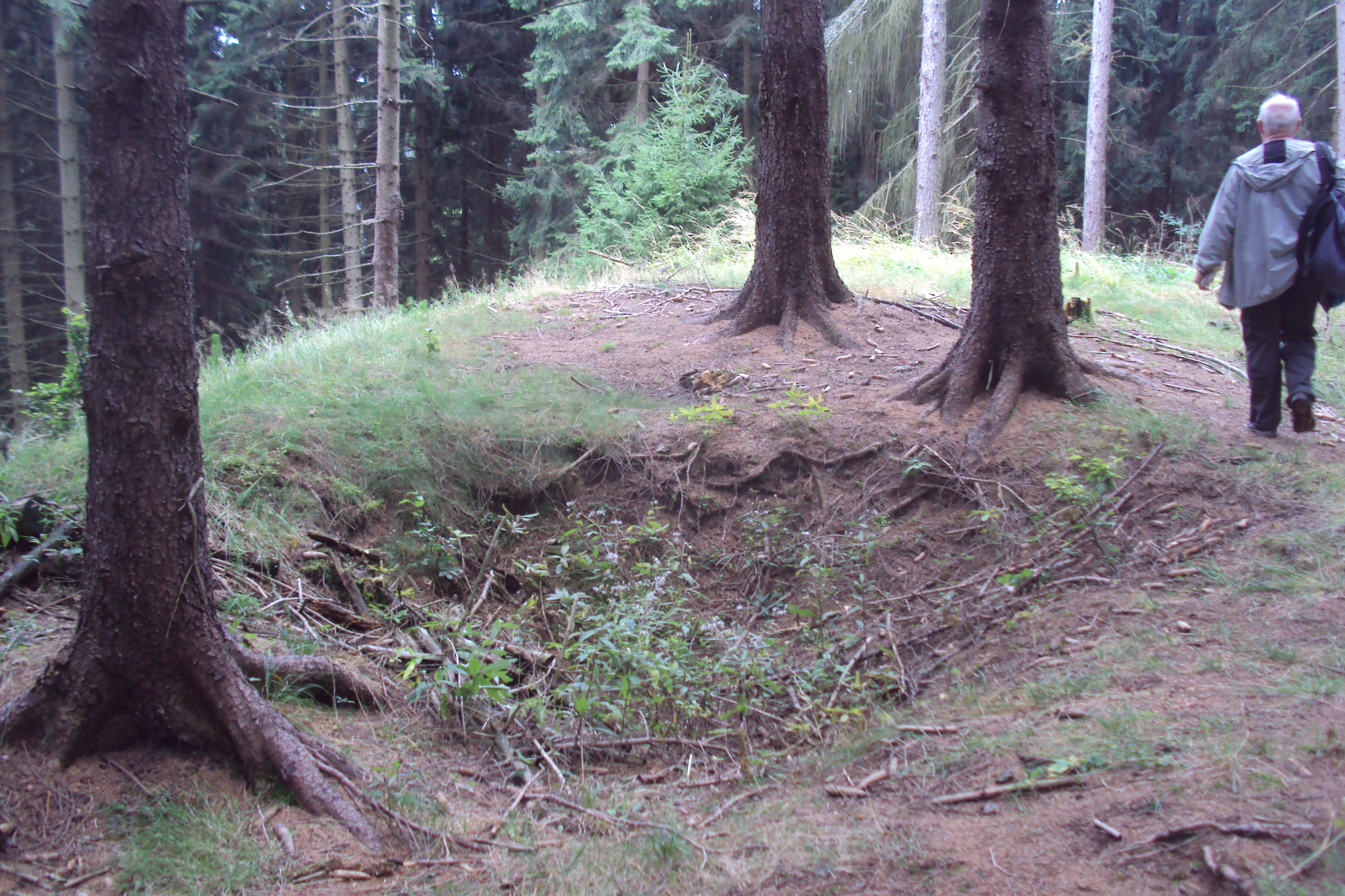 Vrcholek kopce, kde stál Rousínovský hrádek